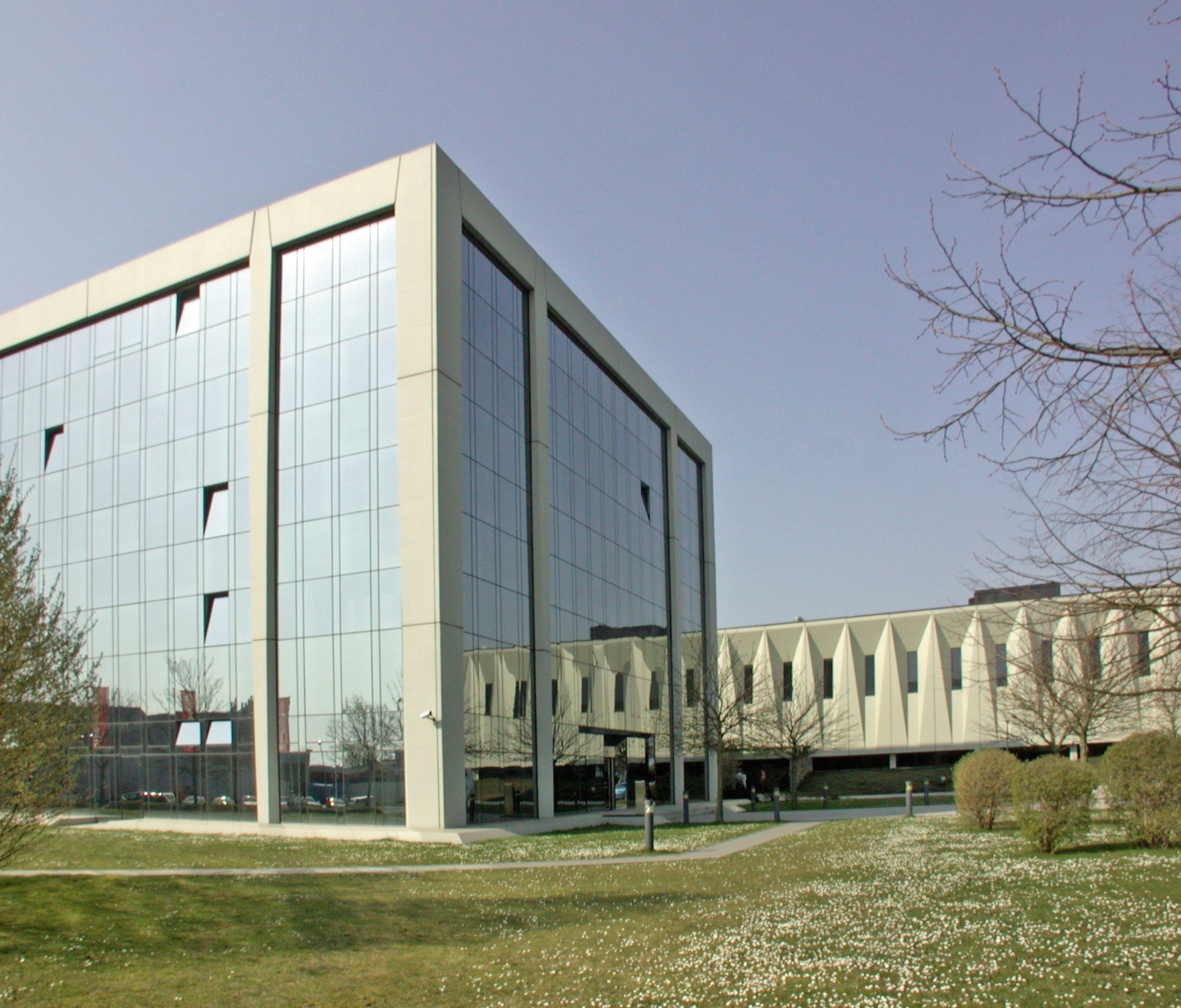 Zentrale des Pharmaunternehmens Mundipharma in Limburg, Deutschland